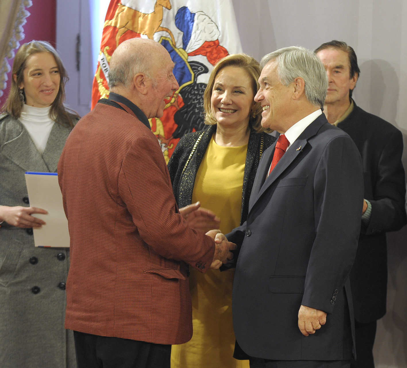 08-06-2012 Entrega de pensiones de gracia a destacados folcloristas chilenos